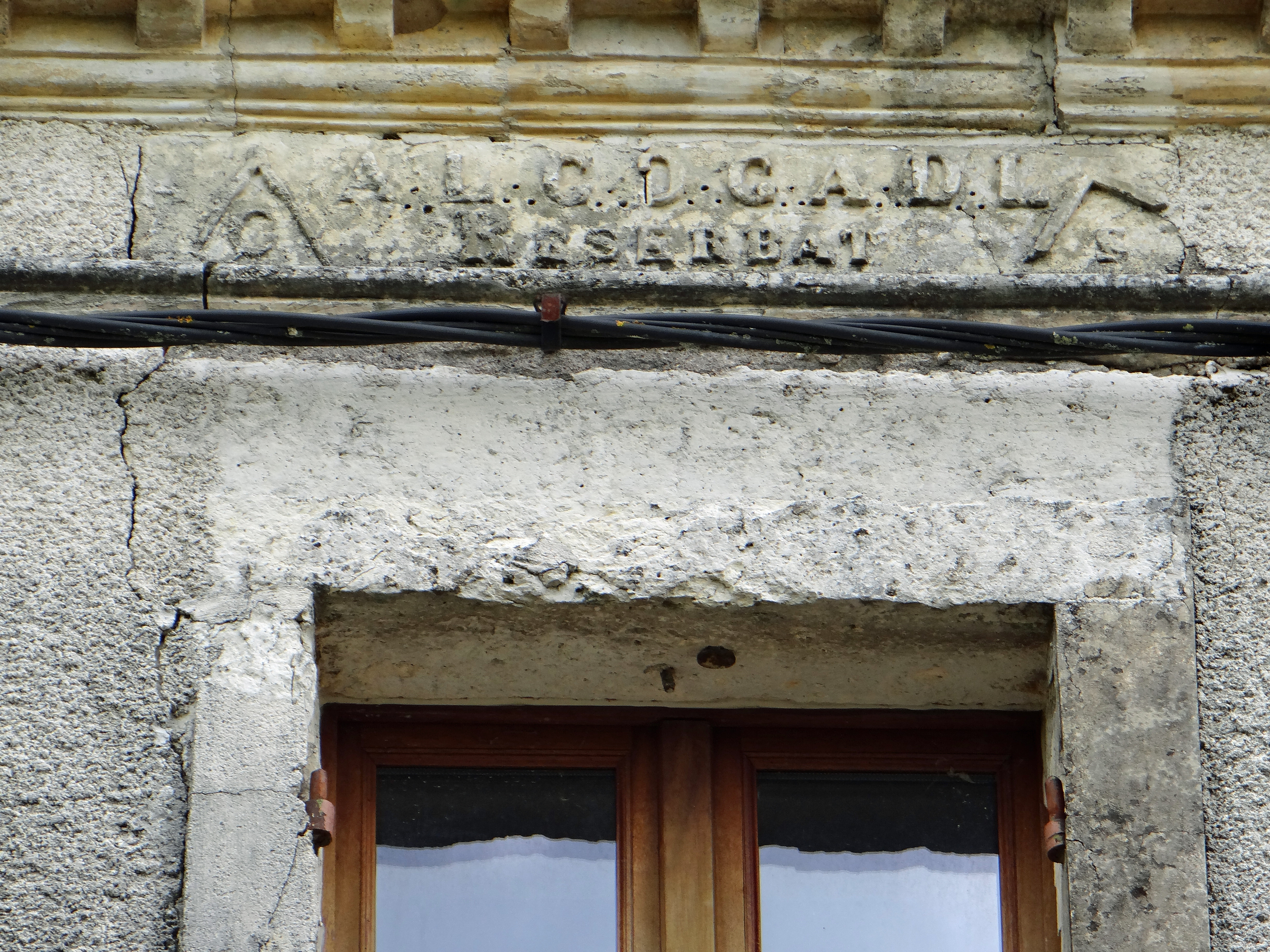 Granges-sur-Lot - Café le Sébastopol - Inscription au-dessus d'une fenêtre du 2ème étage